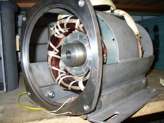 Unterölmotor mit Blick auf Stator und Rotor mit Hohlwelle